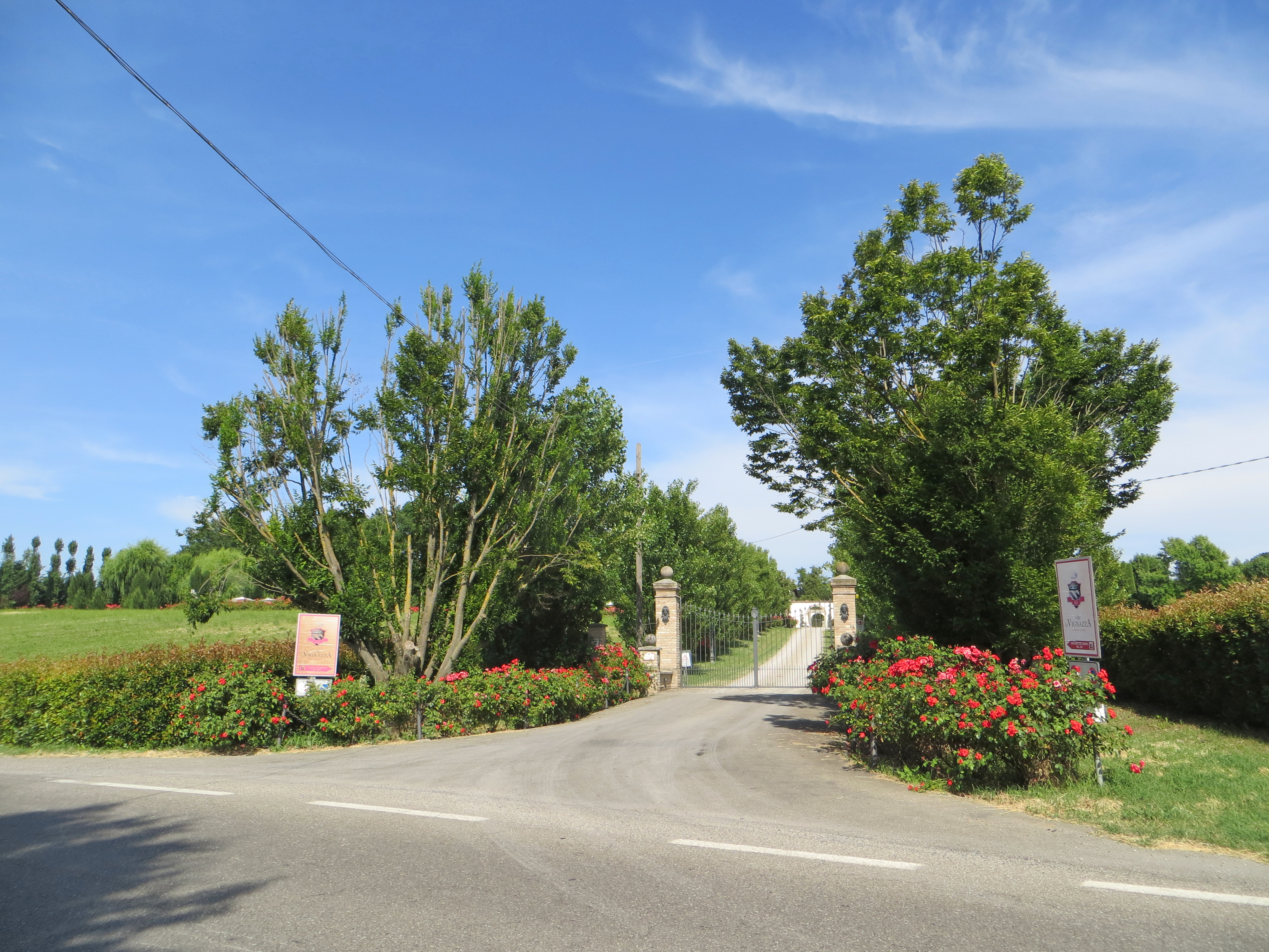 Villa Lalatta Costerbosa (Montechiarugolo) - viale d'ingresso